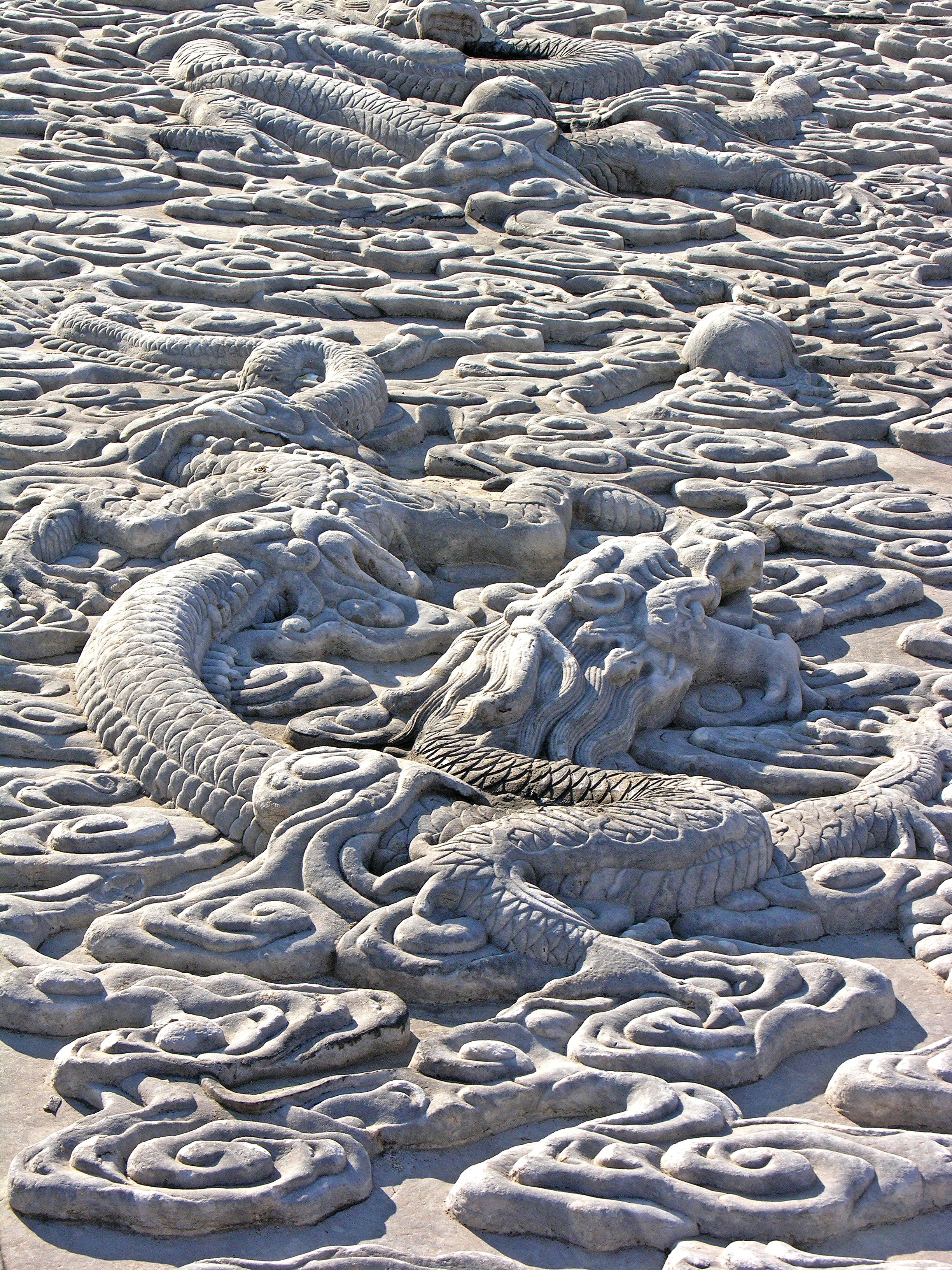 China-6219